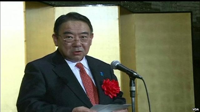 木寺昌人 Masato Kitera